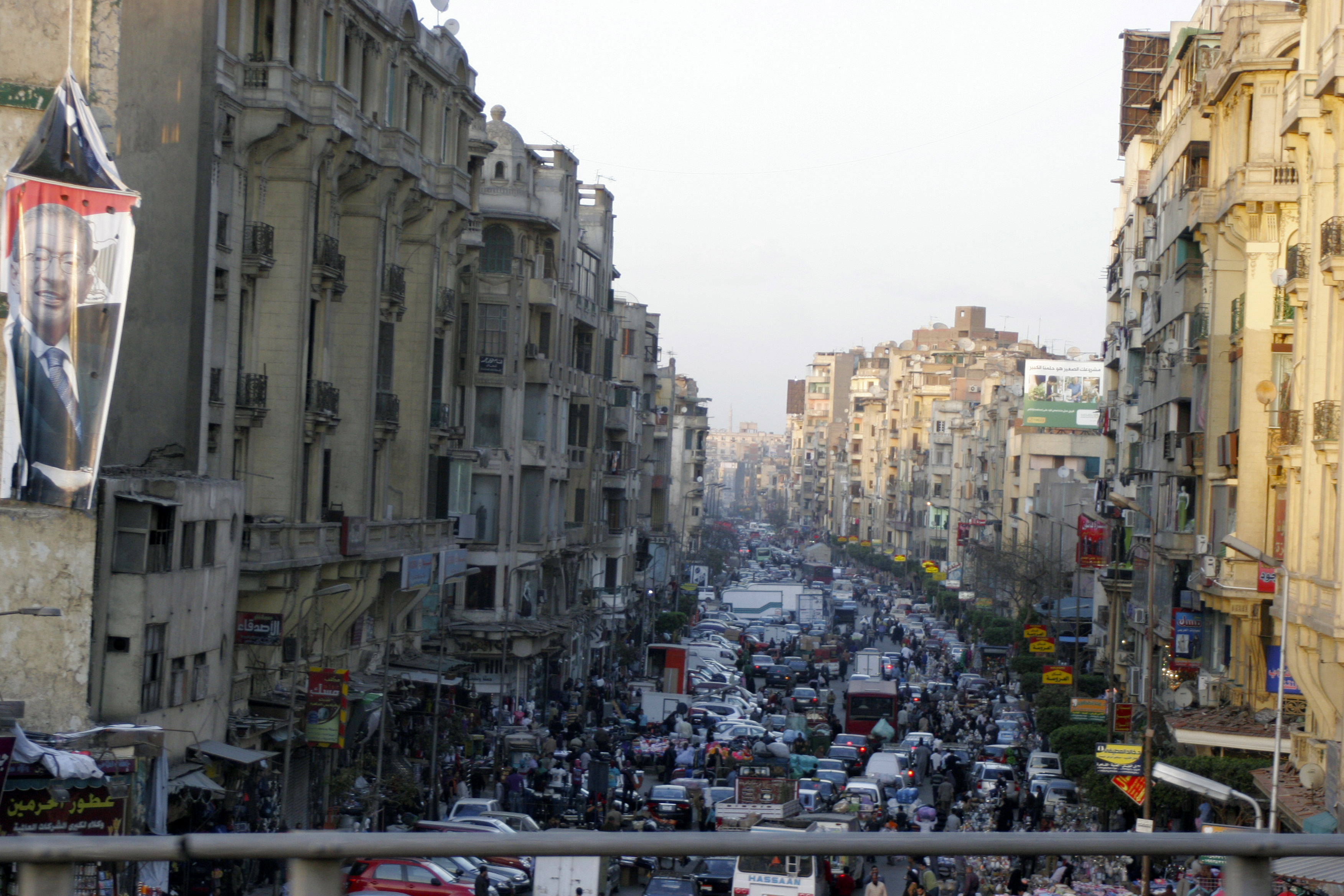 Egypt, Cairo